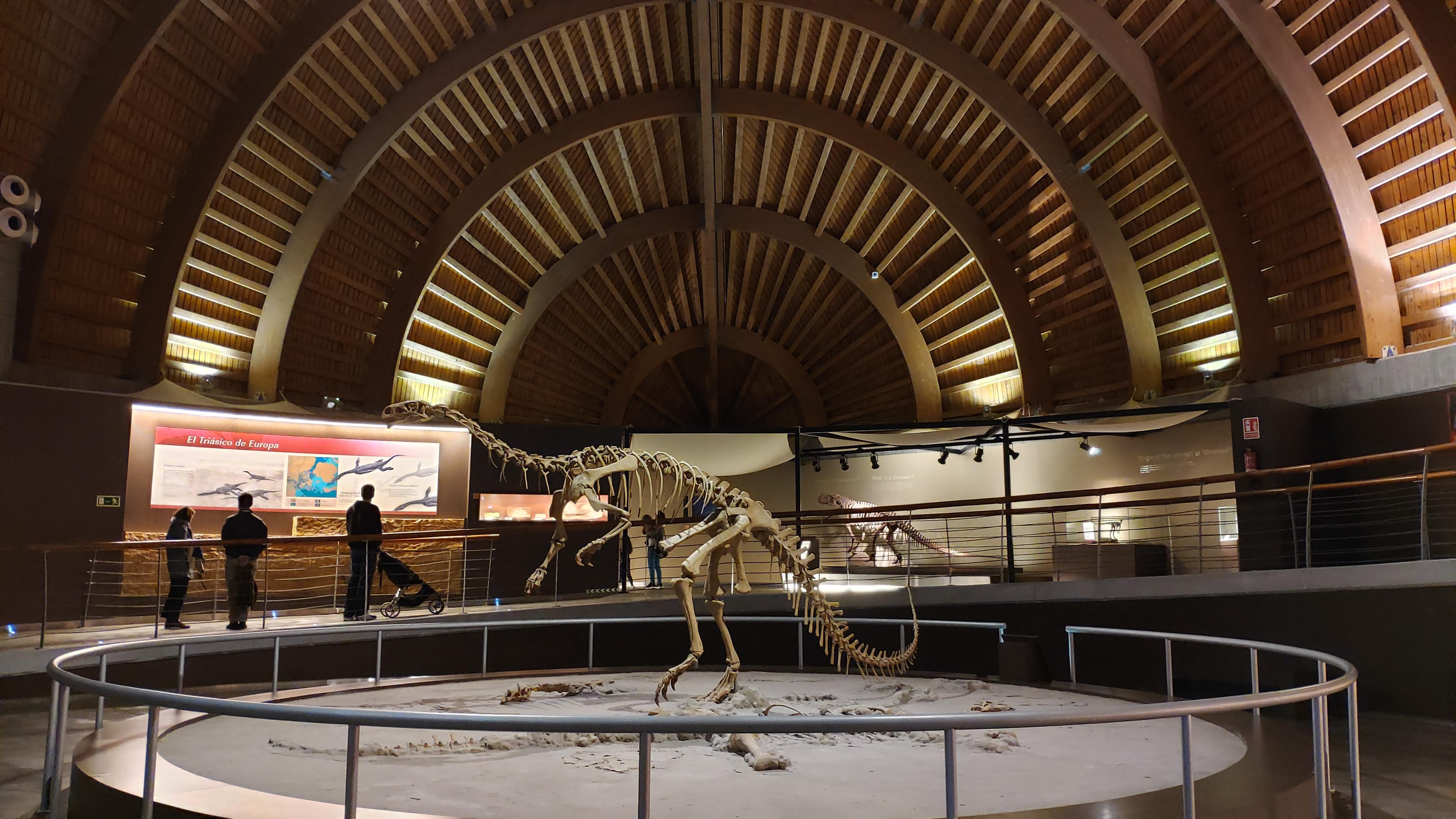 Interior del Museo del Jurásico de Asturias